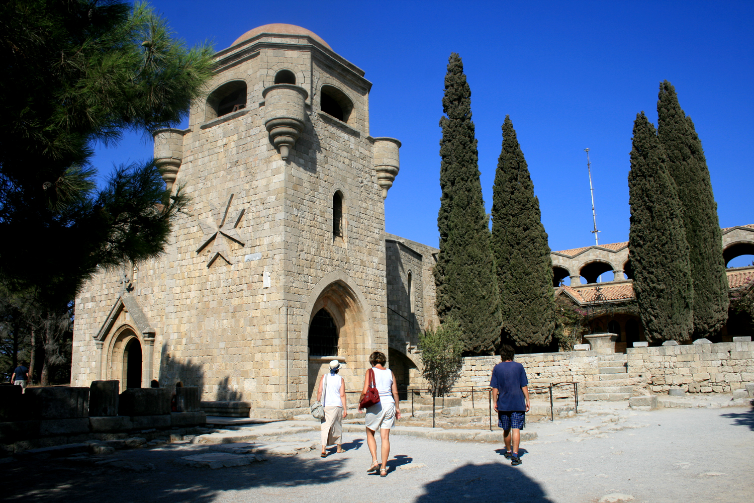 Filerimos monastery, Iálissos, Rhodes Island Klášter Filerimos, Iálissos, ostrov Rhodos photo August 2007 Author= Karelj